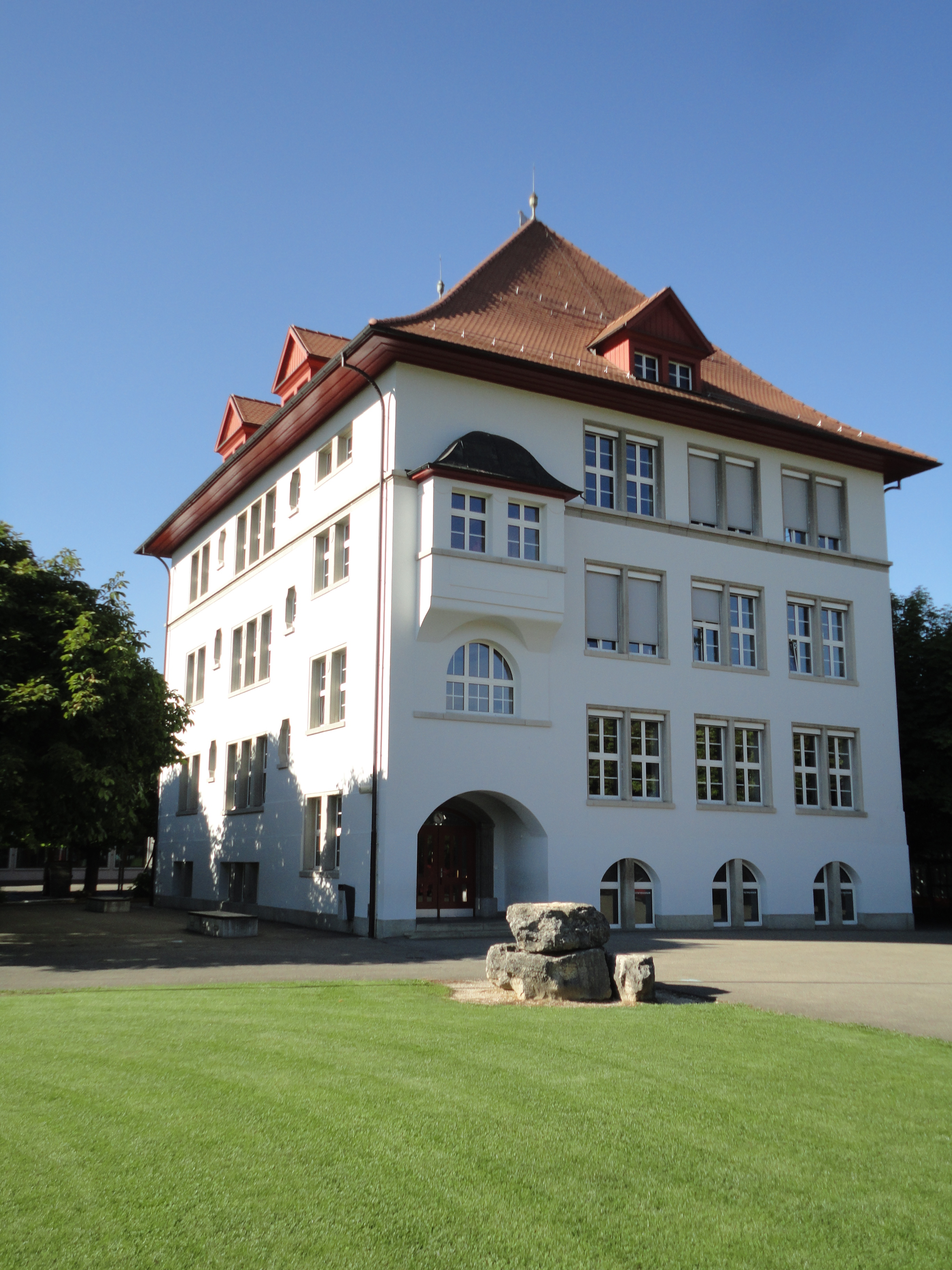 Das Sauriermuseum befindet sich im Untergeschoss des Primarschulhauses 1912 an der Schulstrasse 22 in Frick. Eingang auf Gebäudehinterseite.